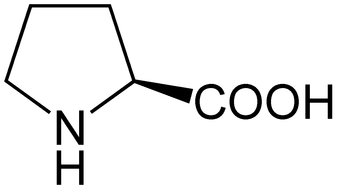 L-Prolin